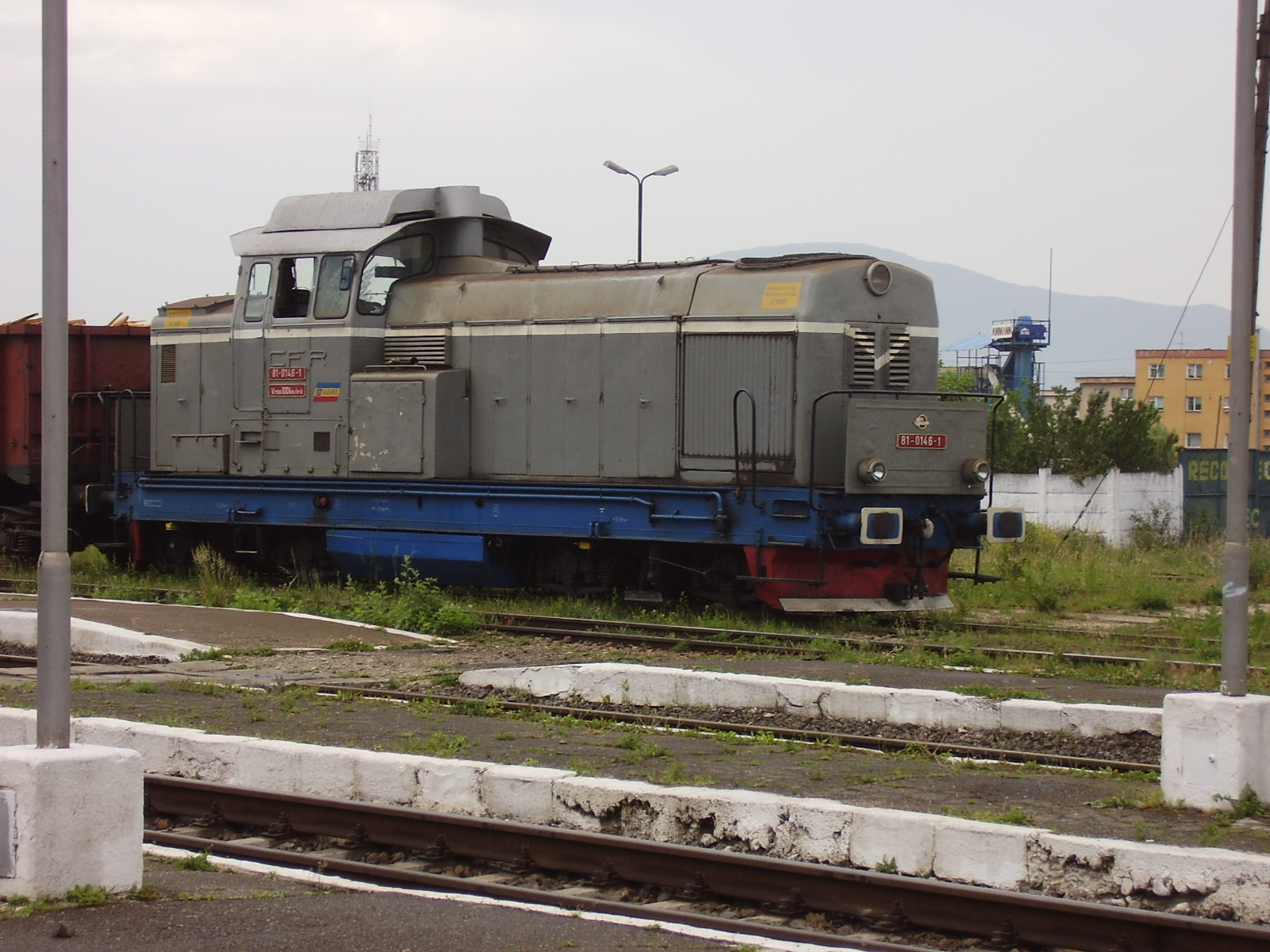 81-0146-1 în Gara Bartolomeu. Foto: Dr2005.